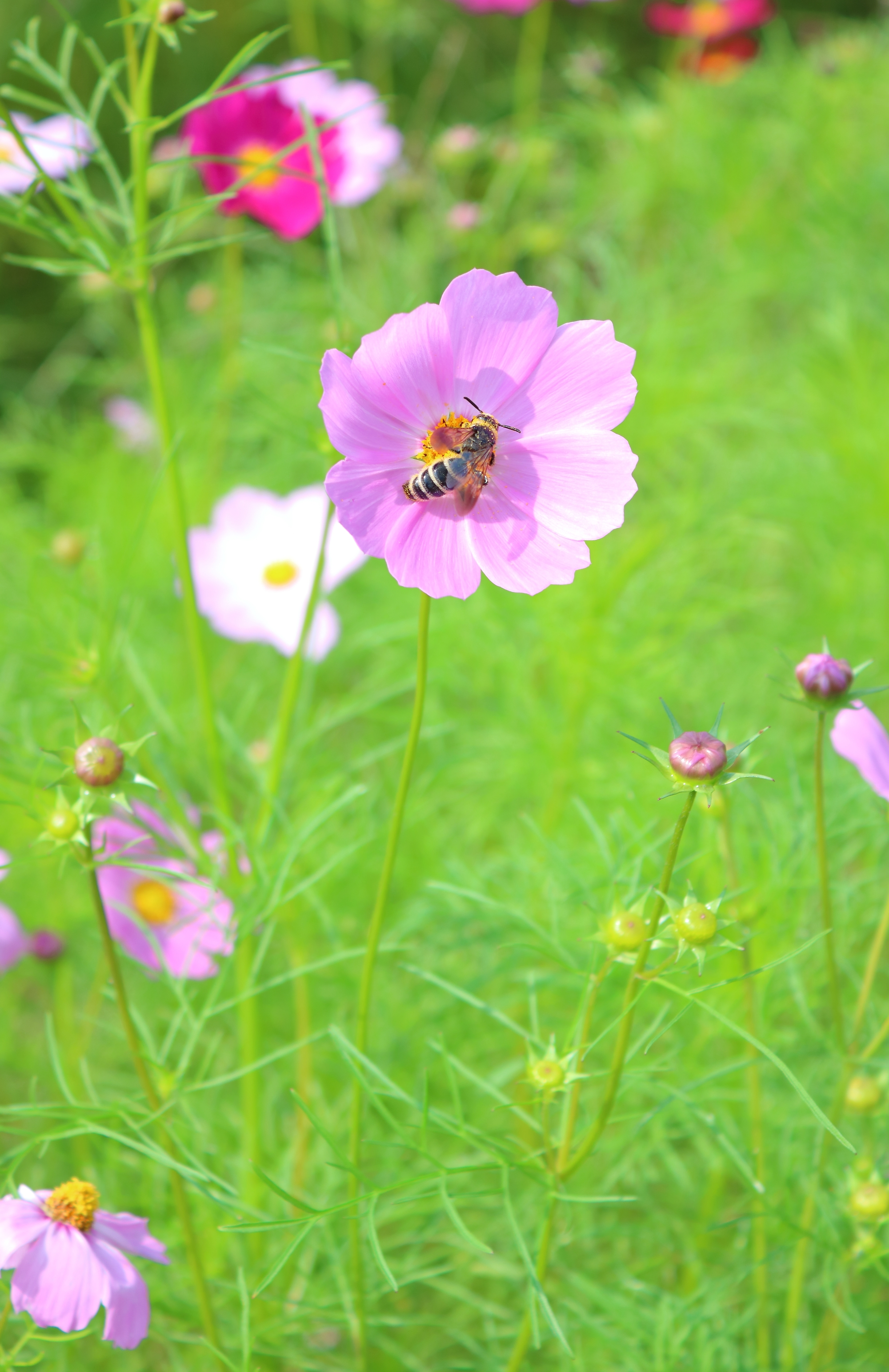 コスモスと蜜蜂（埼玉県日高市「巾着田」）